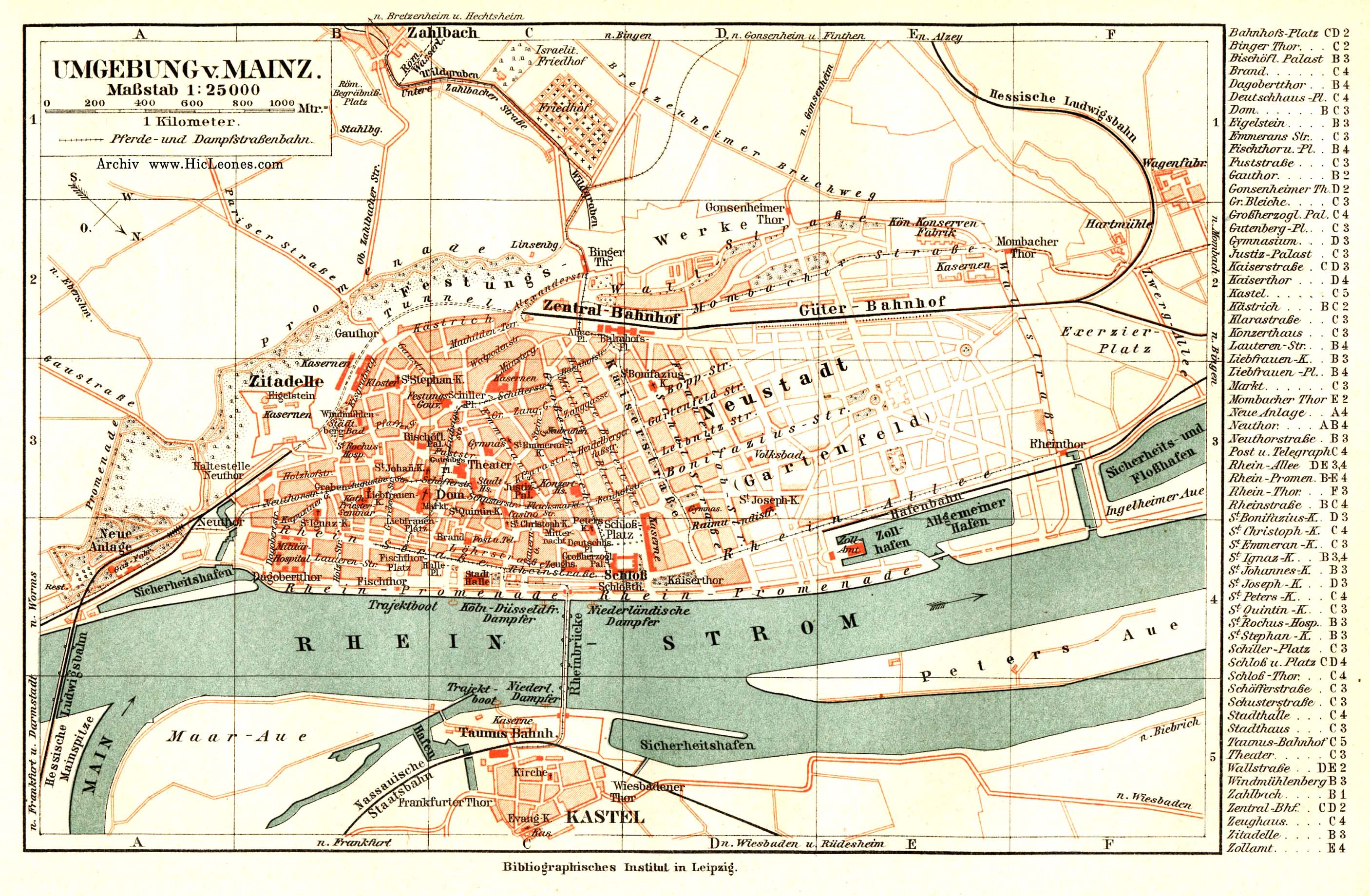 Stadtplan (Umgebung) von Mainz